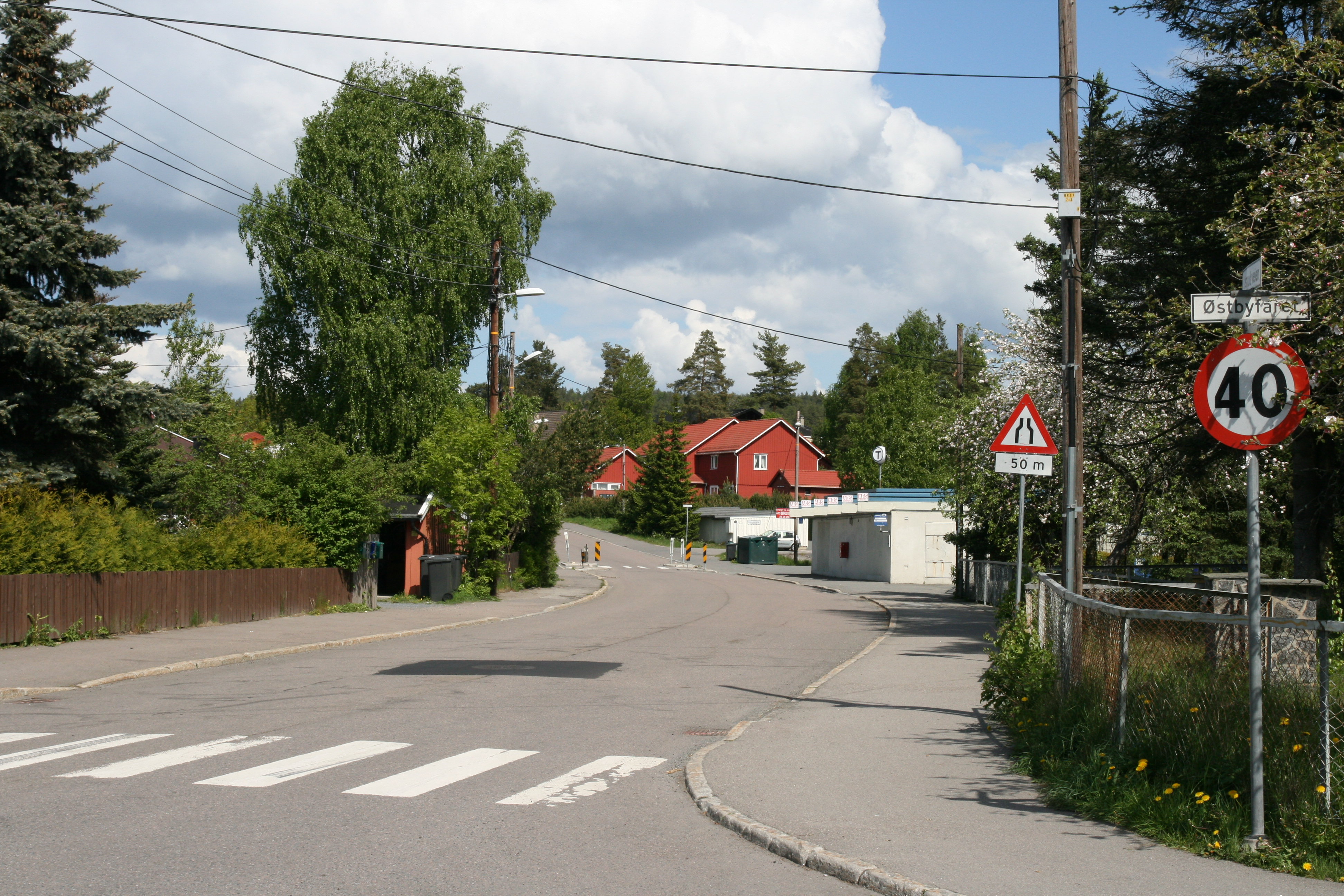 Krysset Ulsrudveien/Østbyfaret. I bakgrunnen Ulsrud T-bane. Ulsrud i Oslo